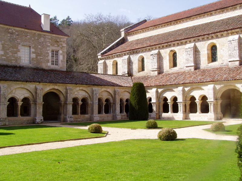 Photo personnelle prise par F Thurion alias Accrochoc le 26 mars 2006 avec un appareil photo numérique de marque Olympus.